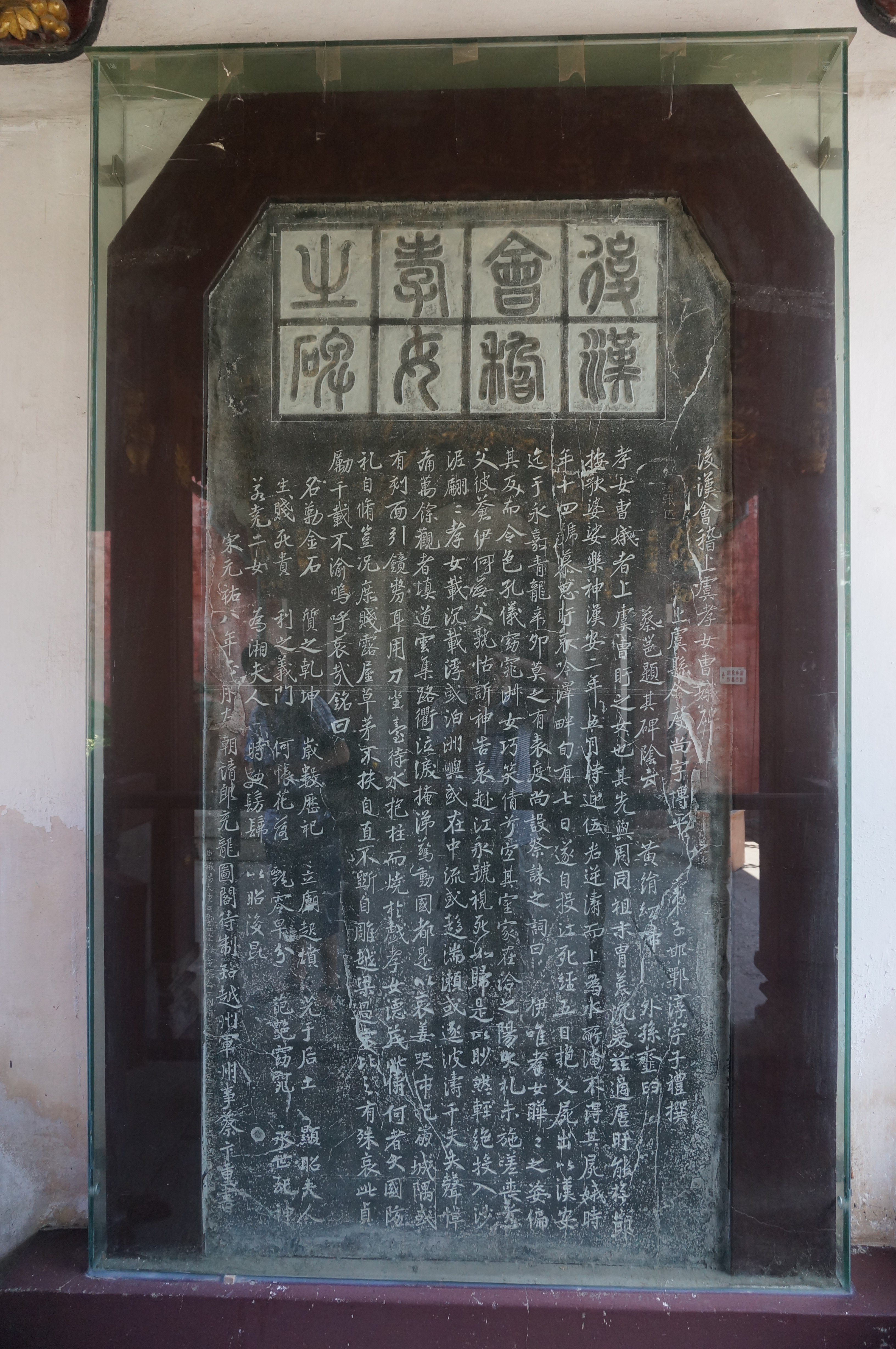 北宋蔡卞摹写之曹娥碑，位于曹娥庙内。